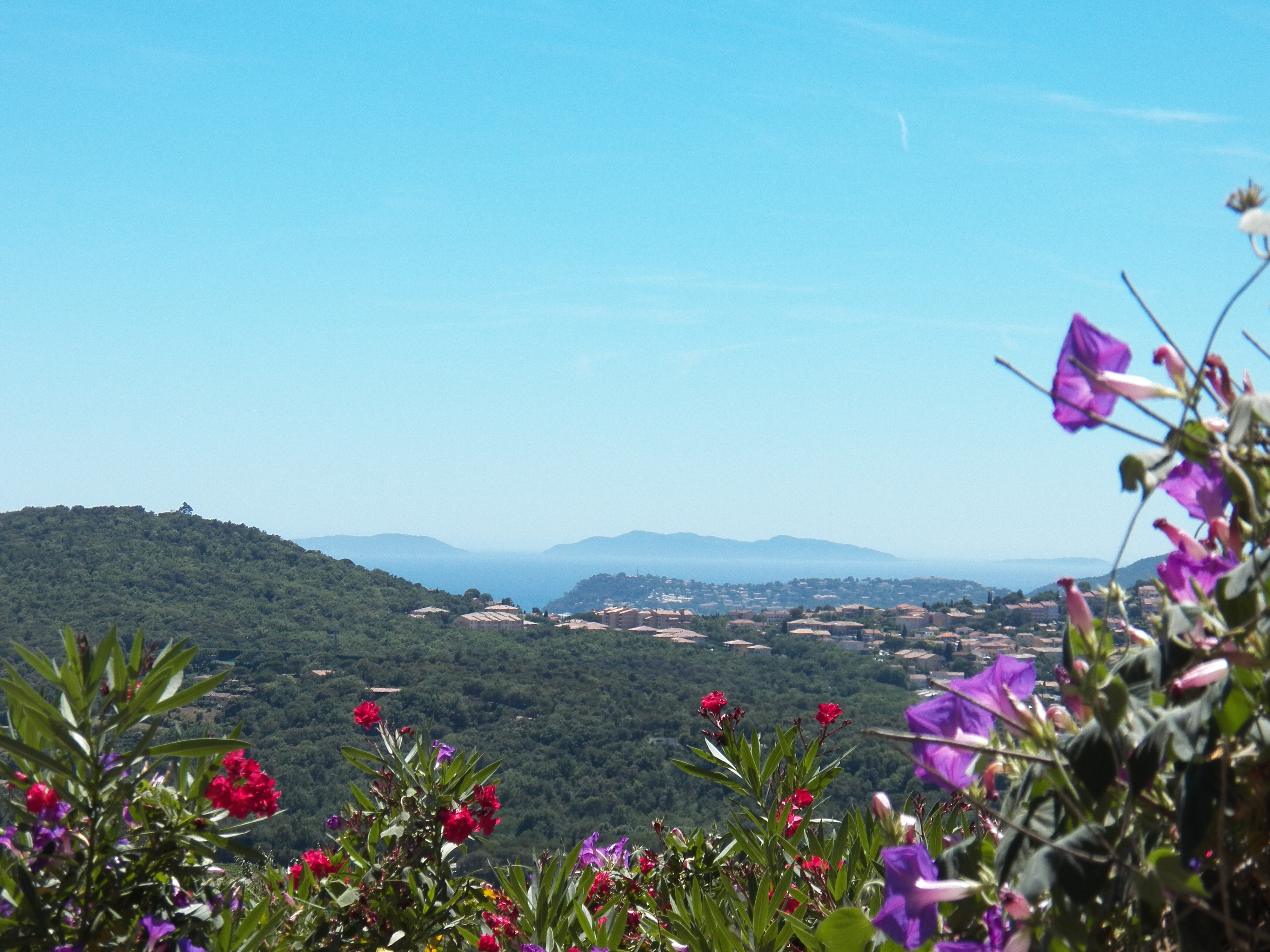 Vue depuis Gassin vers La Croix-Valmer et les îles d'Or d'Hyères